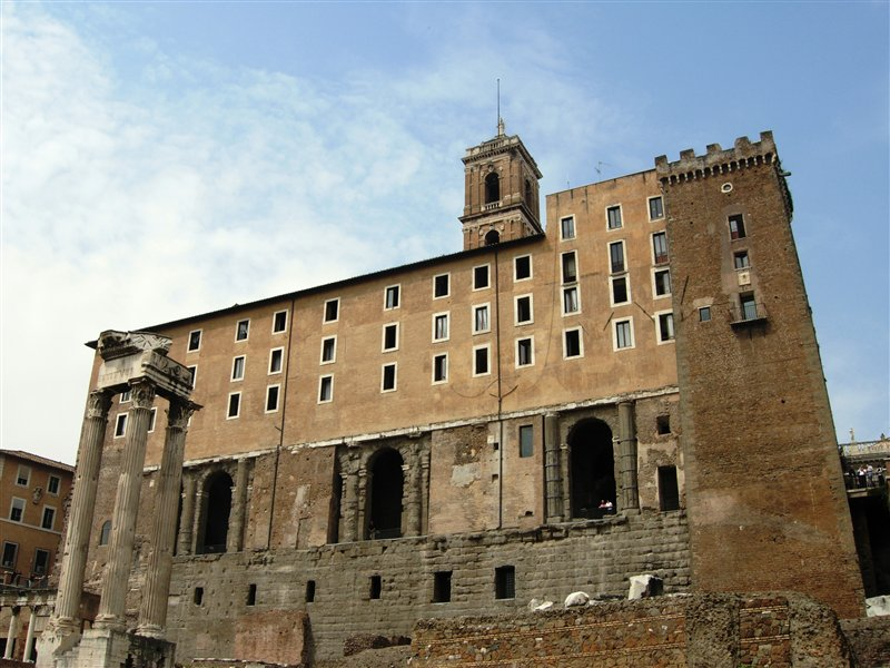 Rome Roman Forum